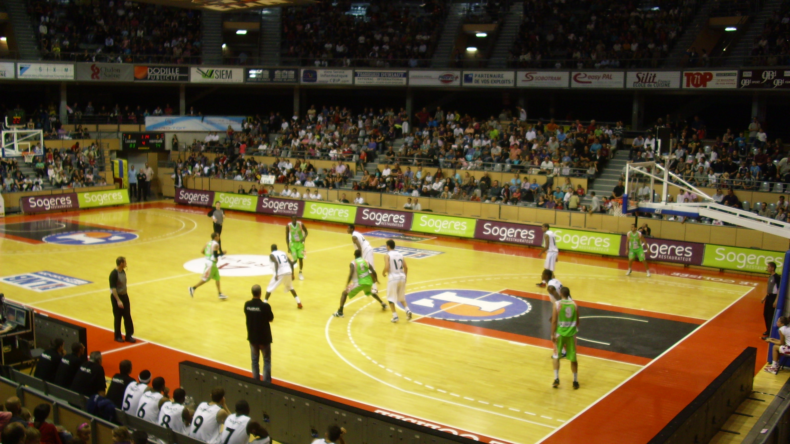 Match amical au colisée entre l'Elan Chalon et la JL Bourg-en-Bresse (saison 2011-2012)